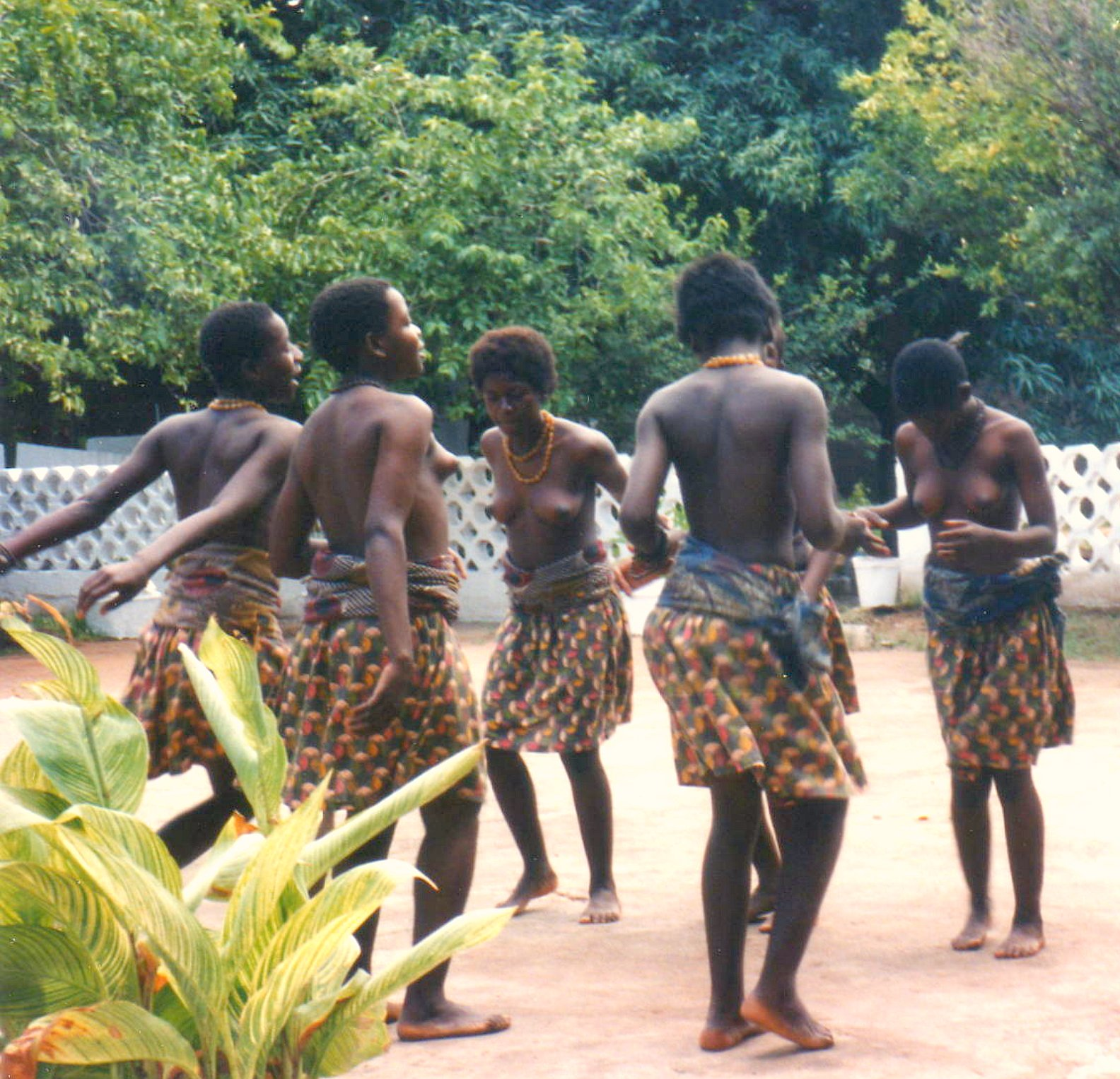 Danses "traditionnelles" en Zambie près d'un car de touristes